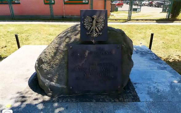 Tablica poświęcona 35 leciu powstania Związku Walki Młodych w Kutnie